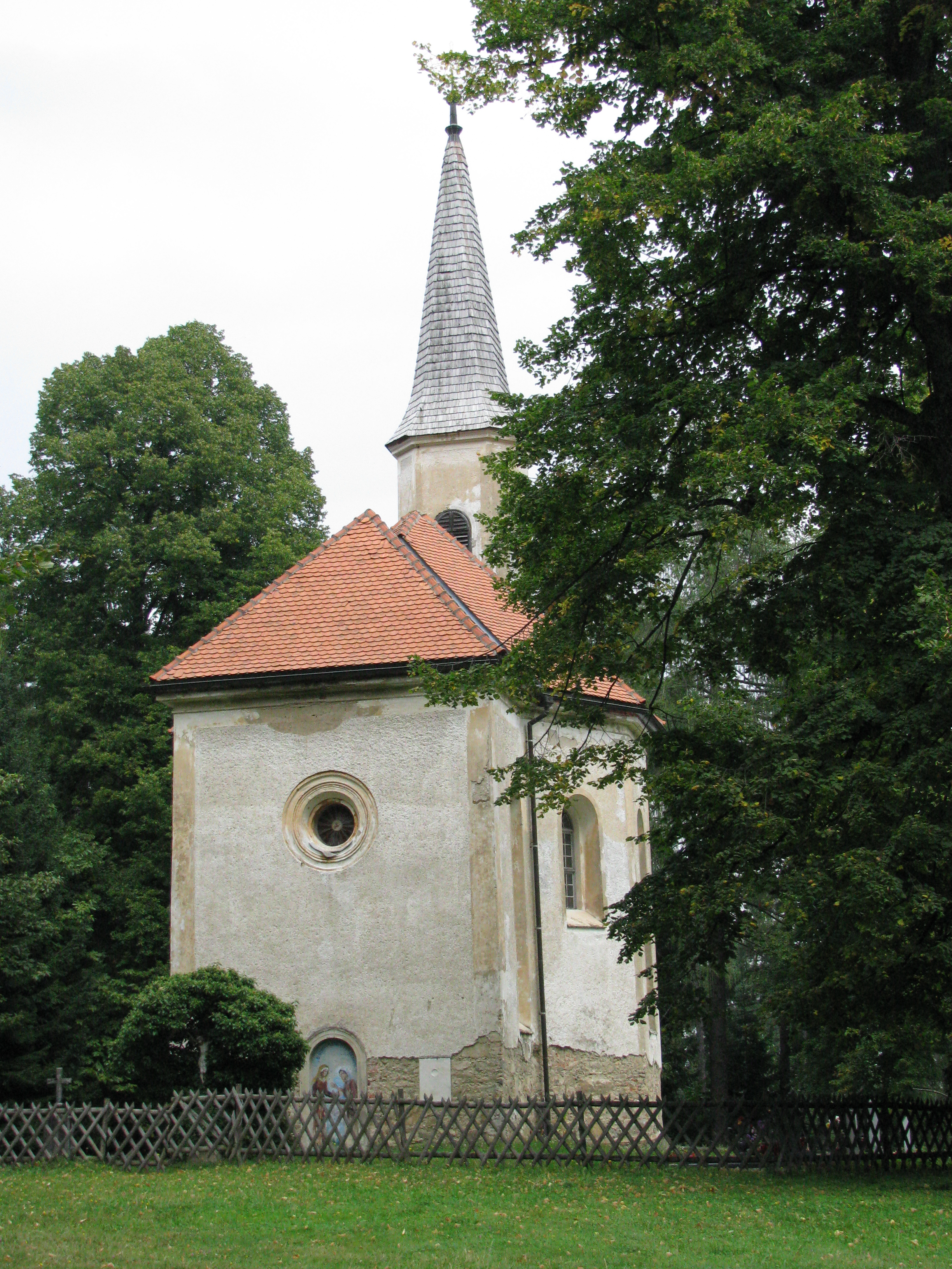 Cerkev sv. Marije, Smolnik (Ruško Pohorje).